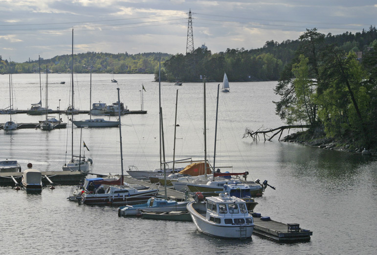 Bild på Fisksätras marina. Foto: Sebastian Vidovic, 2004.